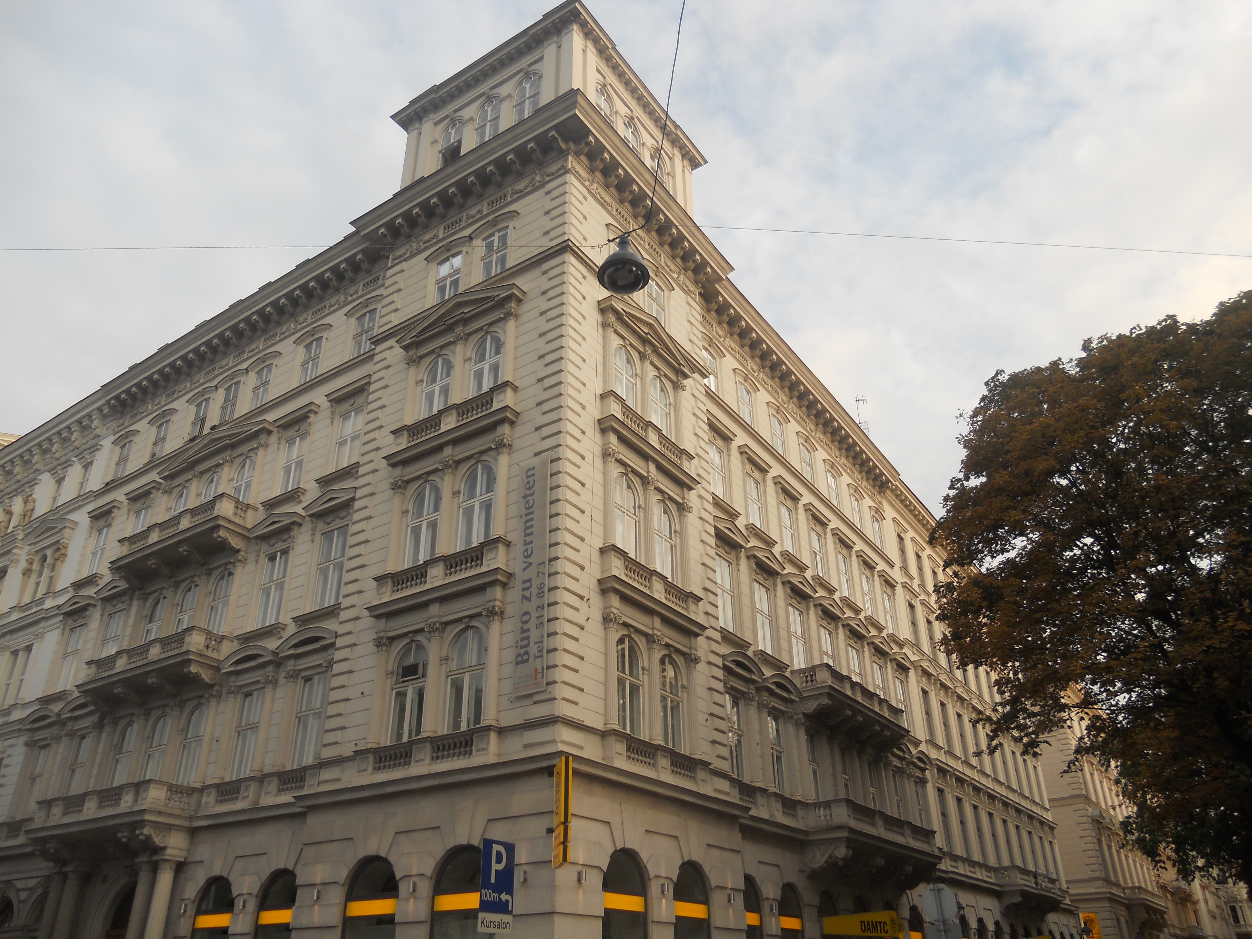 Haus Schubertring 1 (=Johannesgasse 20) in Wien